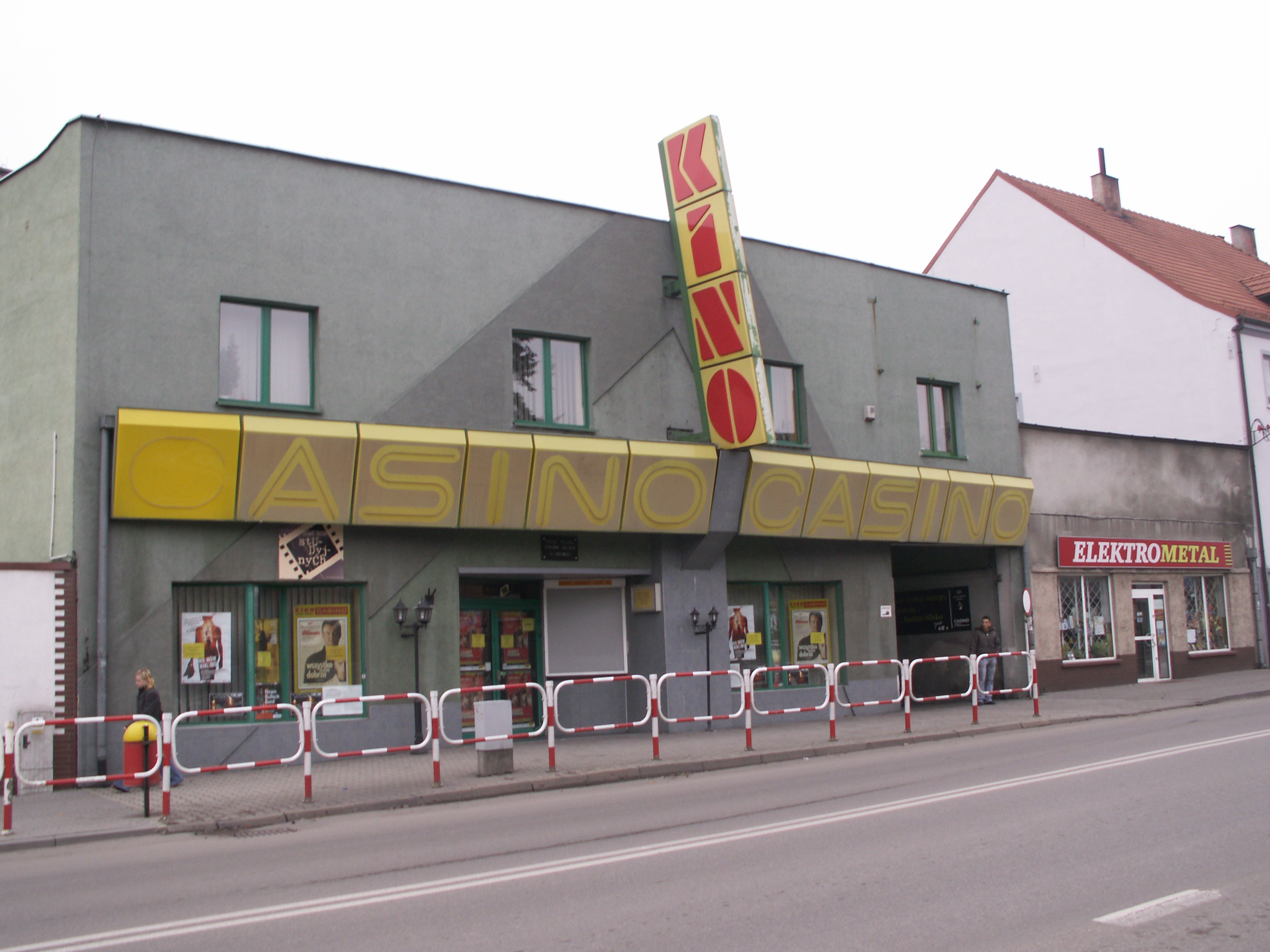 Kino Casino - podlegające pod Centrum Kultury Knurów.